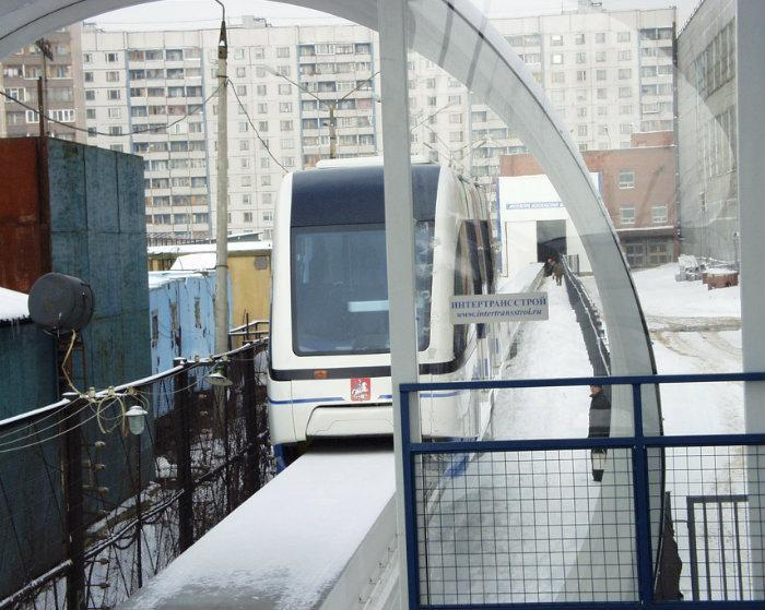 Поезд P30 на испытательном участке Московского монорельса на территории Московского института теплотехники